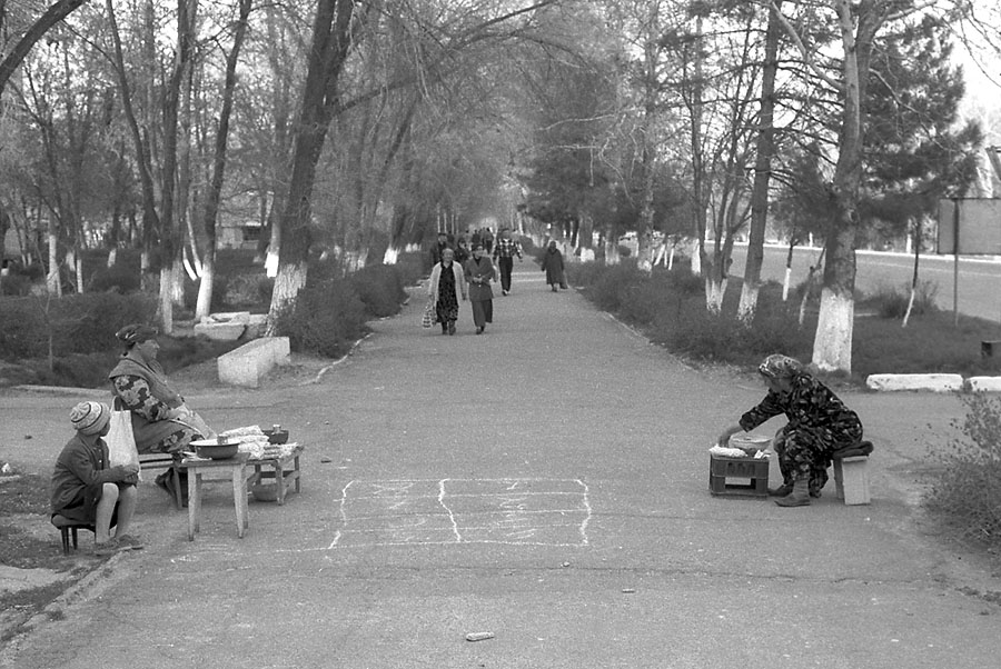 Angren, Uzbekistan